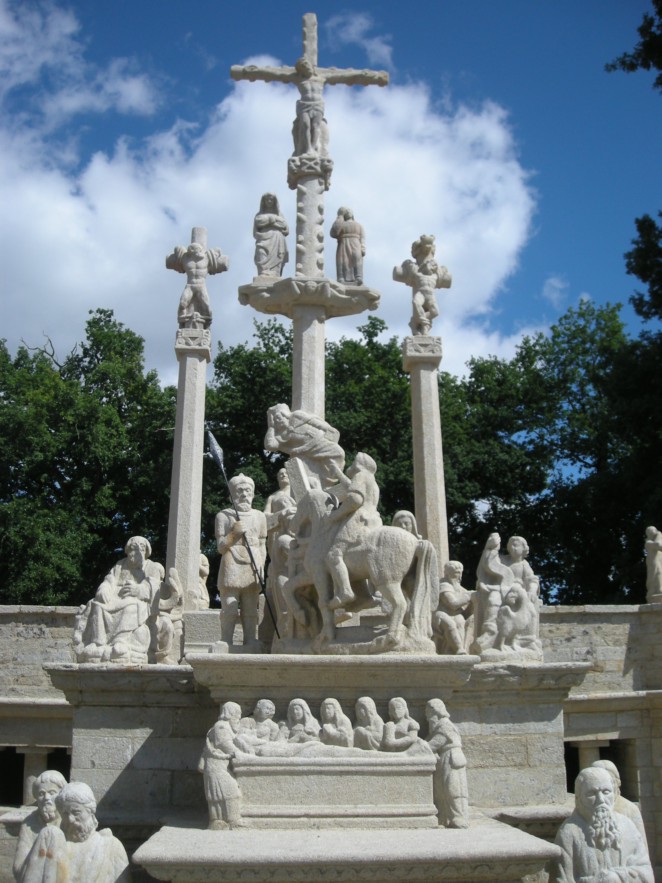 Calvaire du 16e siècle .